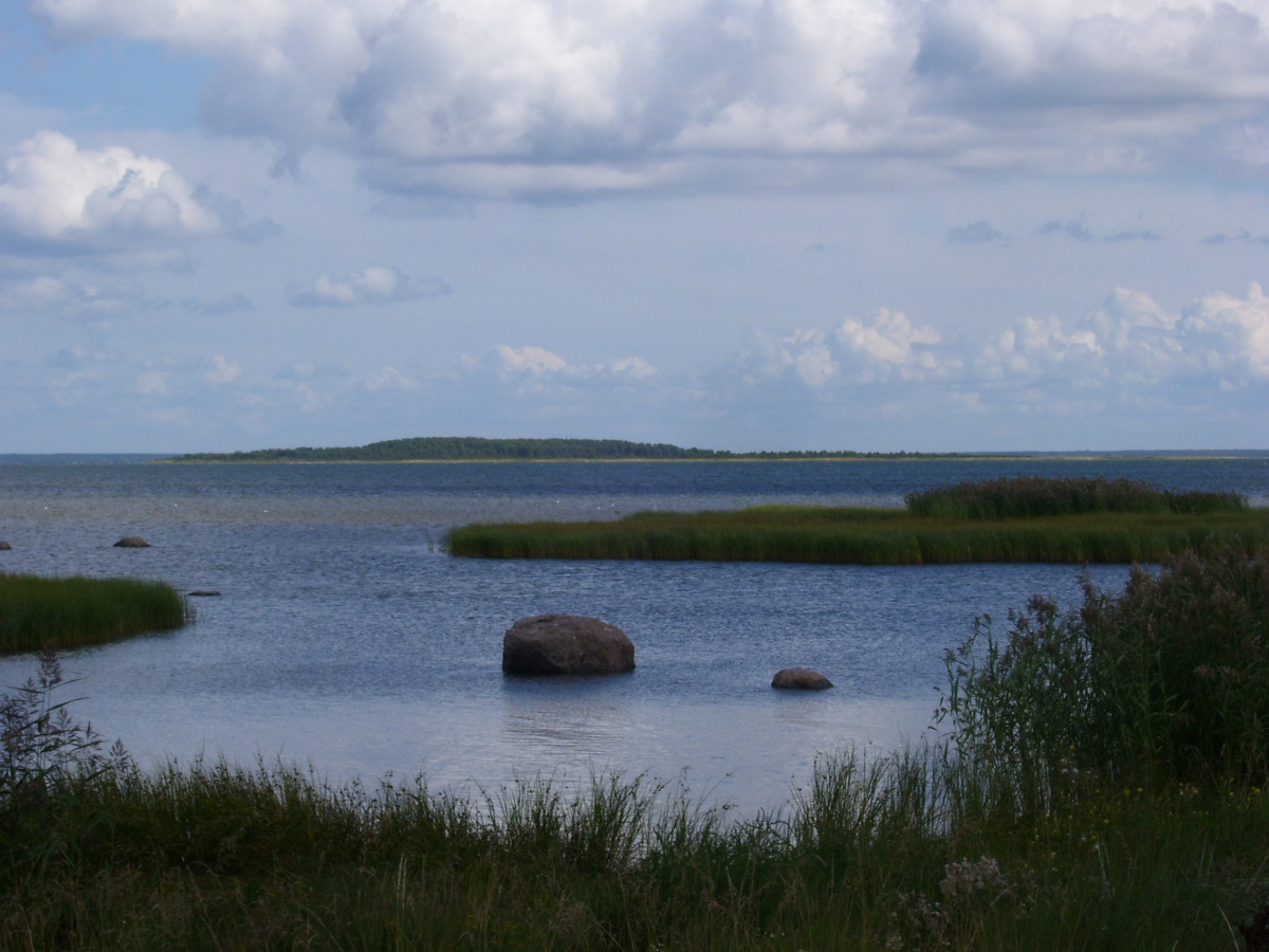 Vaade Kadakalaiule ja Uuemererahule Sääre ninalt